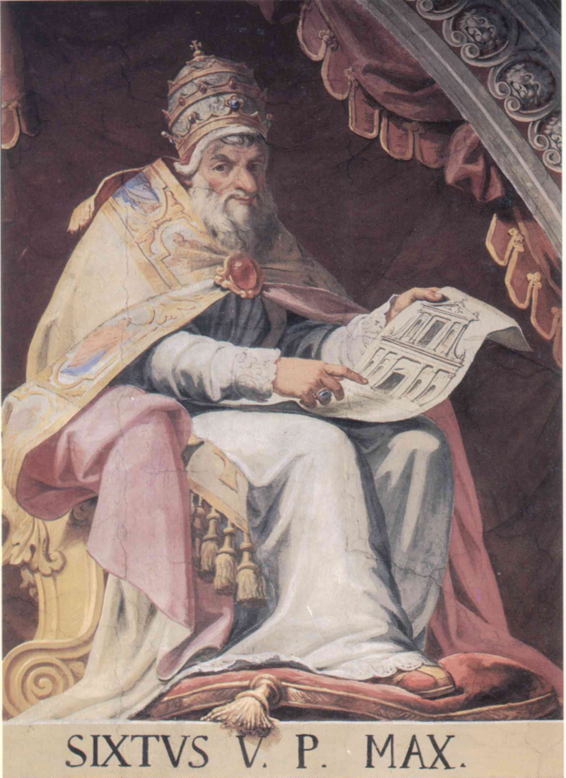 Sixto V con tiara